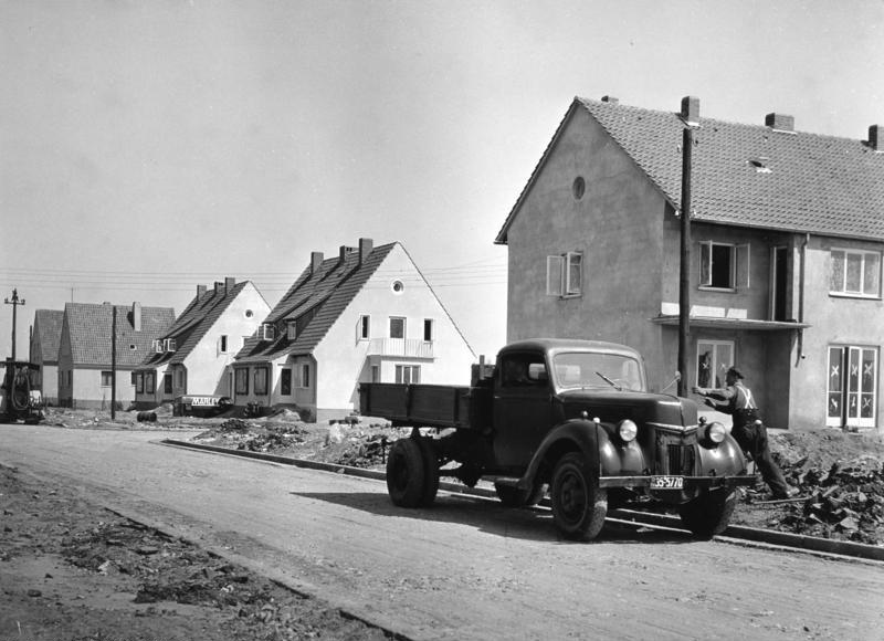 Hannover 1954 Wohnungsbau in aufgelockerter Bauweise Information added by Wikimedia users.